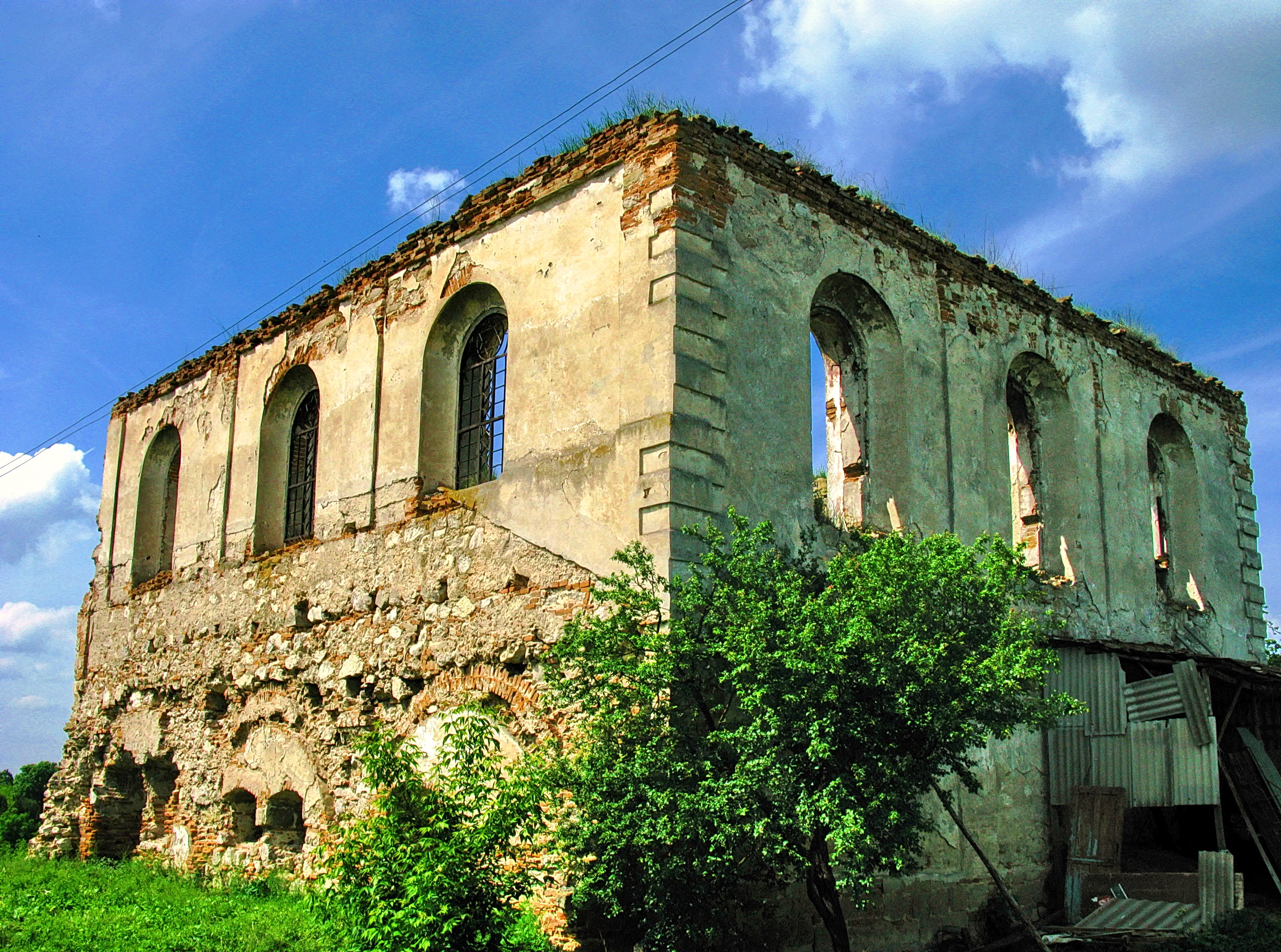 Синагога(мур.), Гримайлів